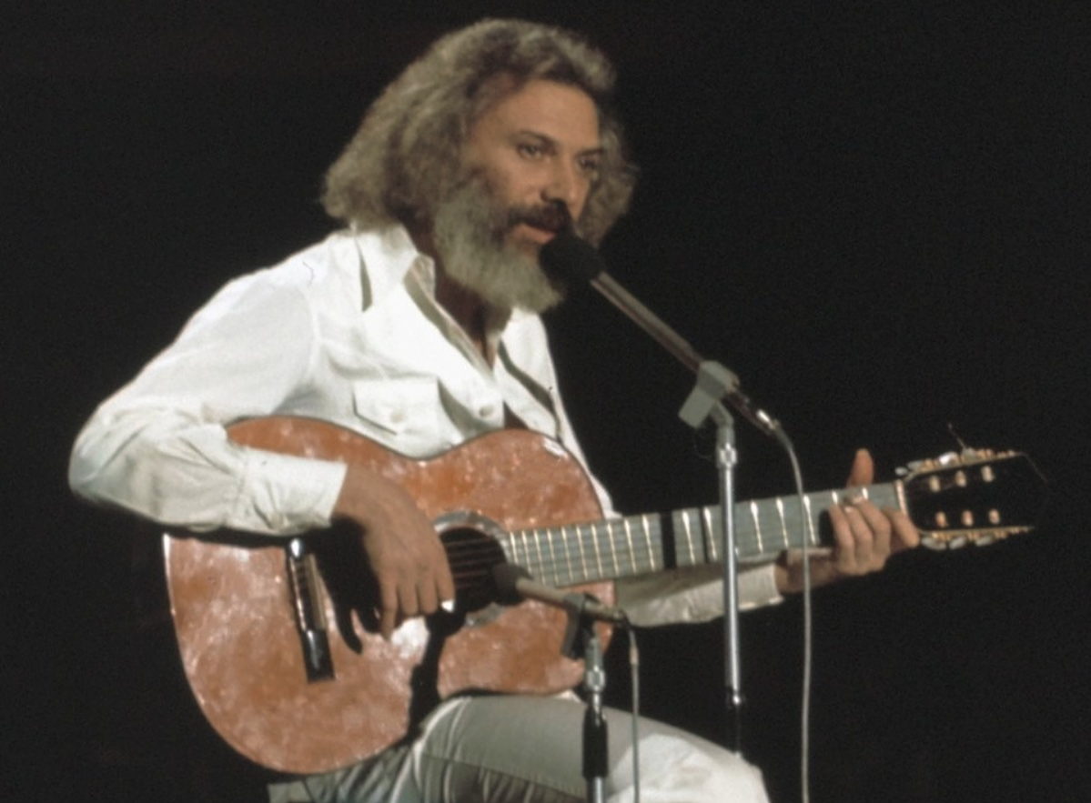 Georges Moustaki au grand gala du disque populaire en 1974 : image cadrée sur la guitare